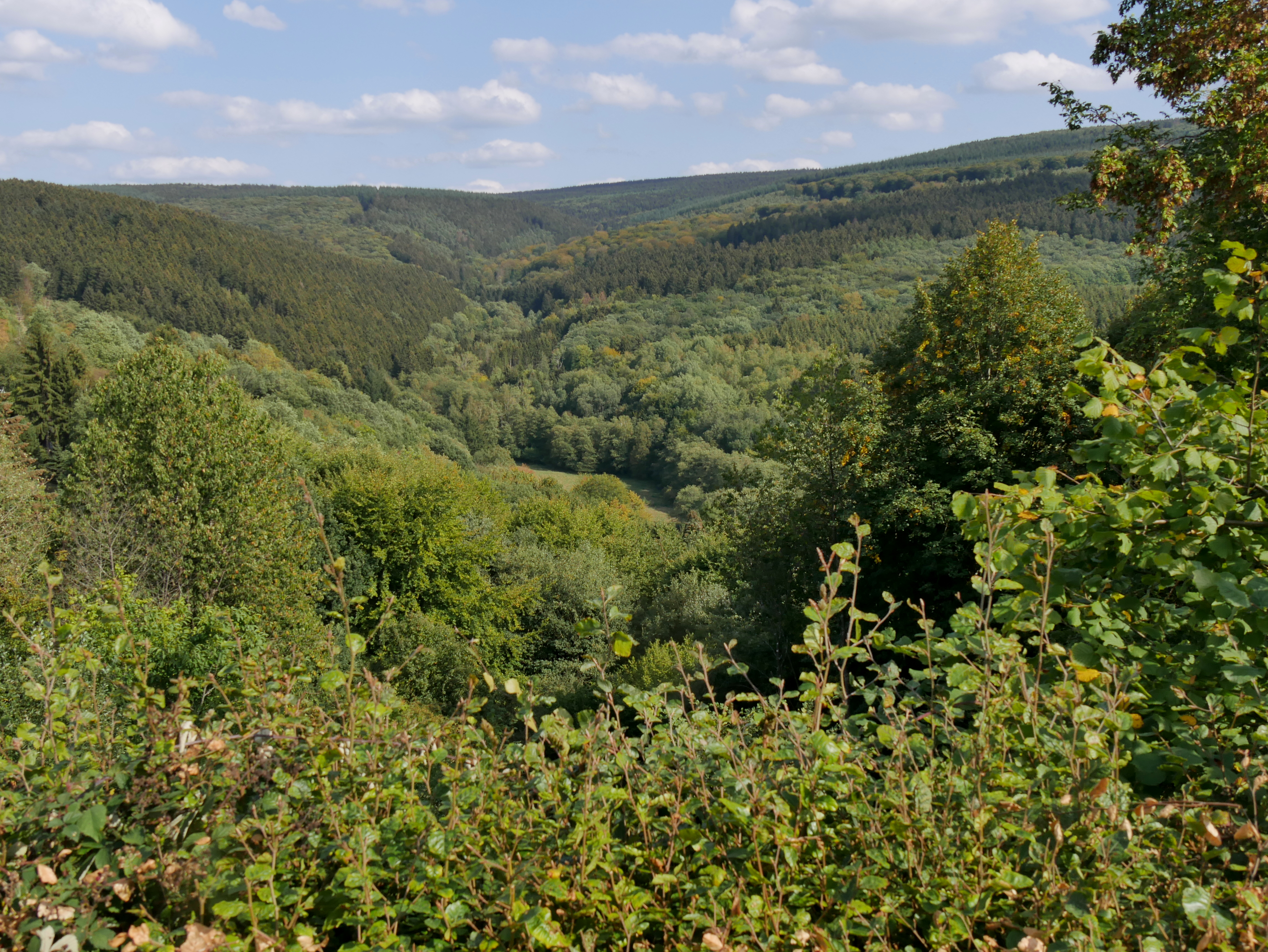 Naturschutzgebiet Enterbachtal - Blick von Holzerath auf das östliche Ende des Naturschutzgebiets (unten im Tal) und auf den Hochwald